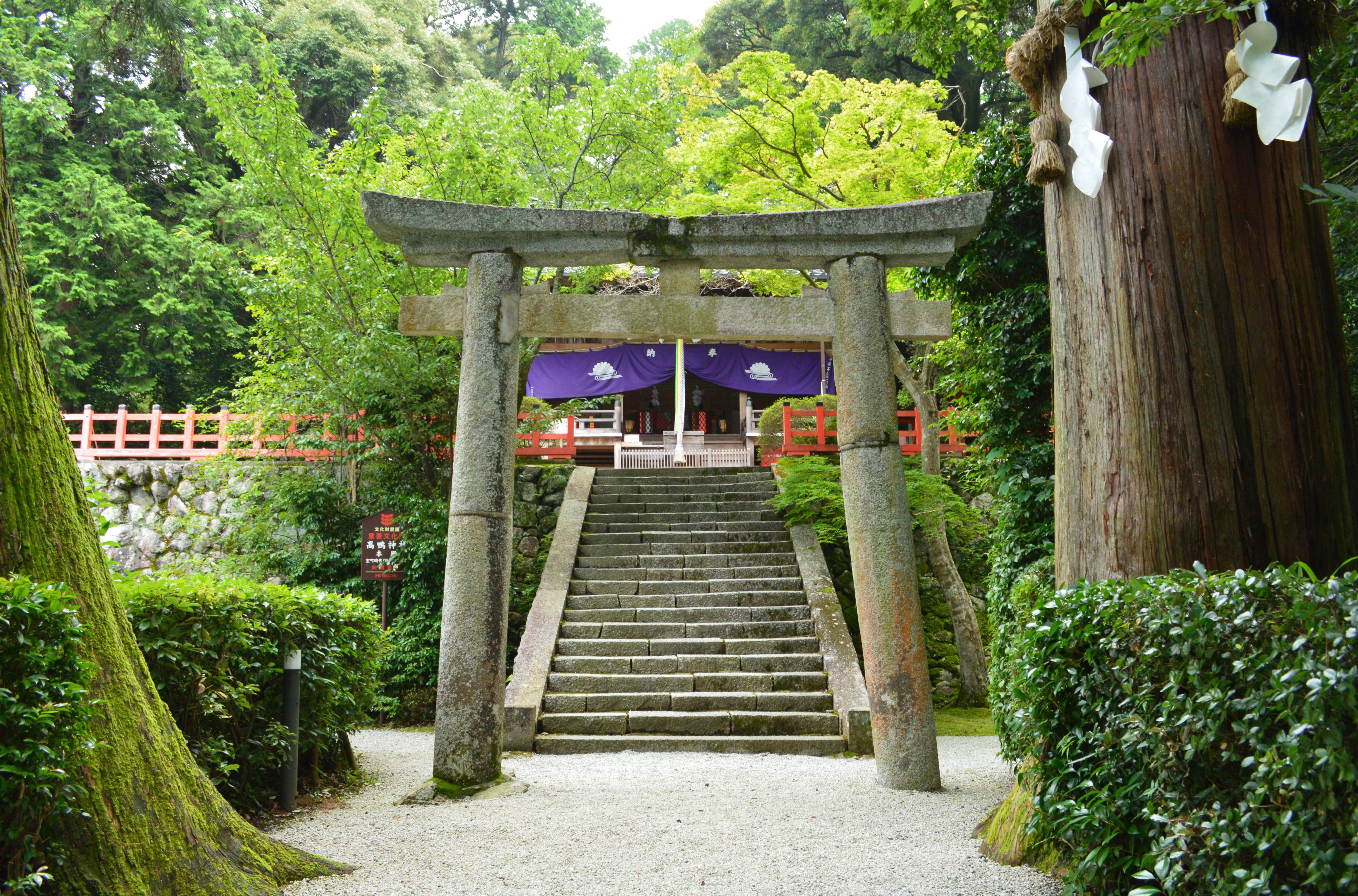 高鴨神社 境内鳥居